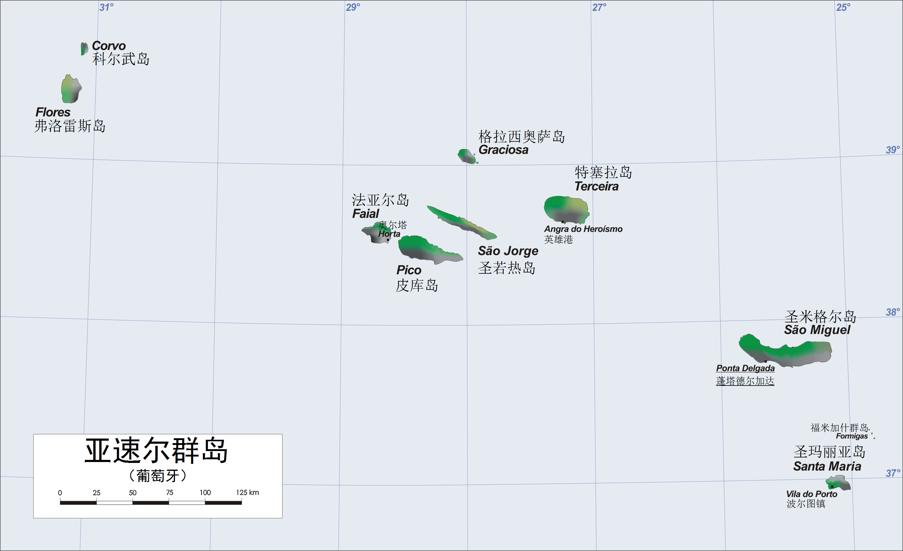 葡萄牙亚速尔群岛地图 *varp绘制